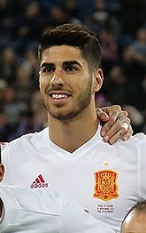 Spain national association football team